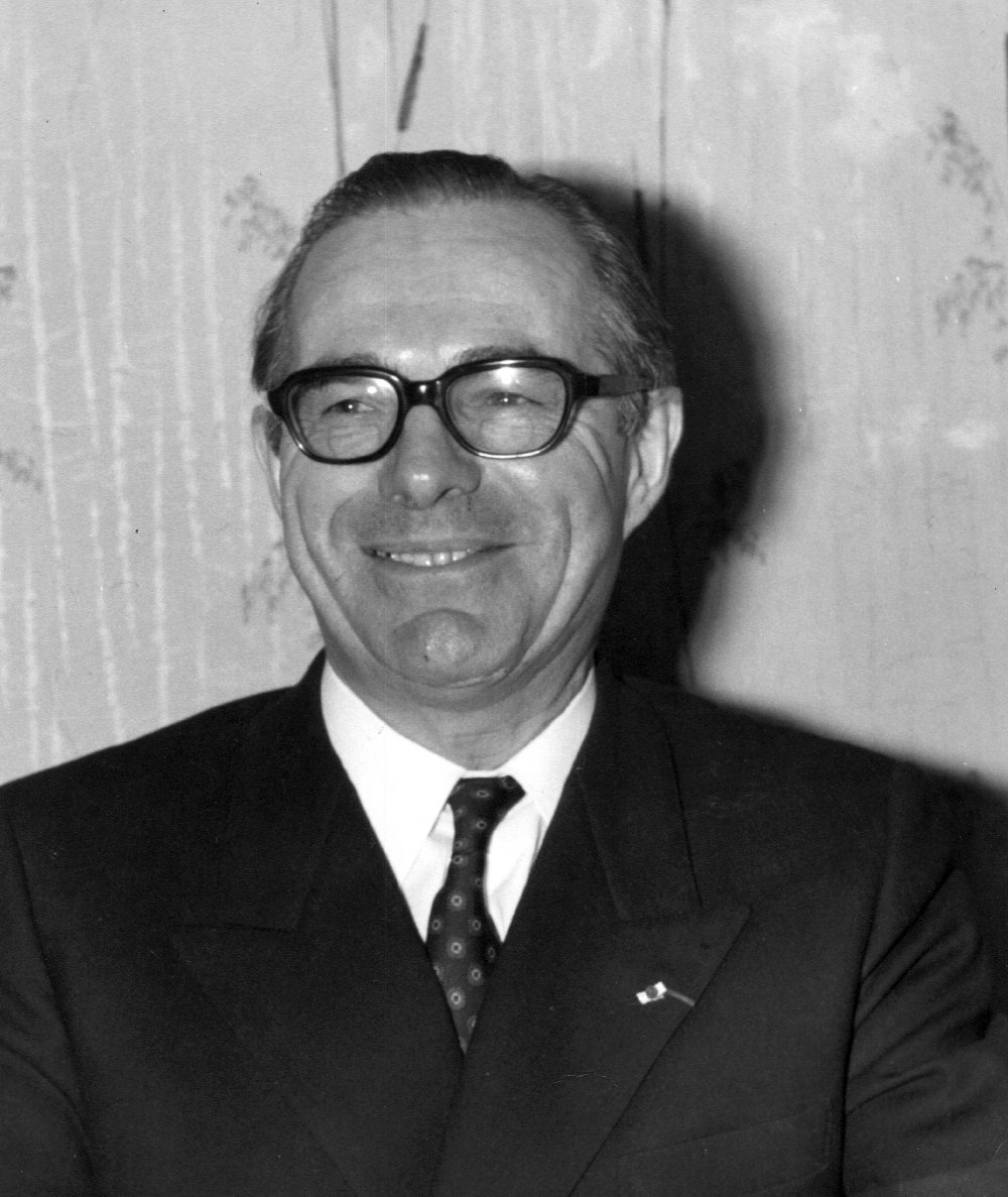 Paul Rivière en 1969